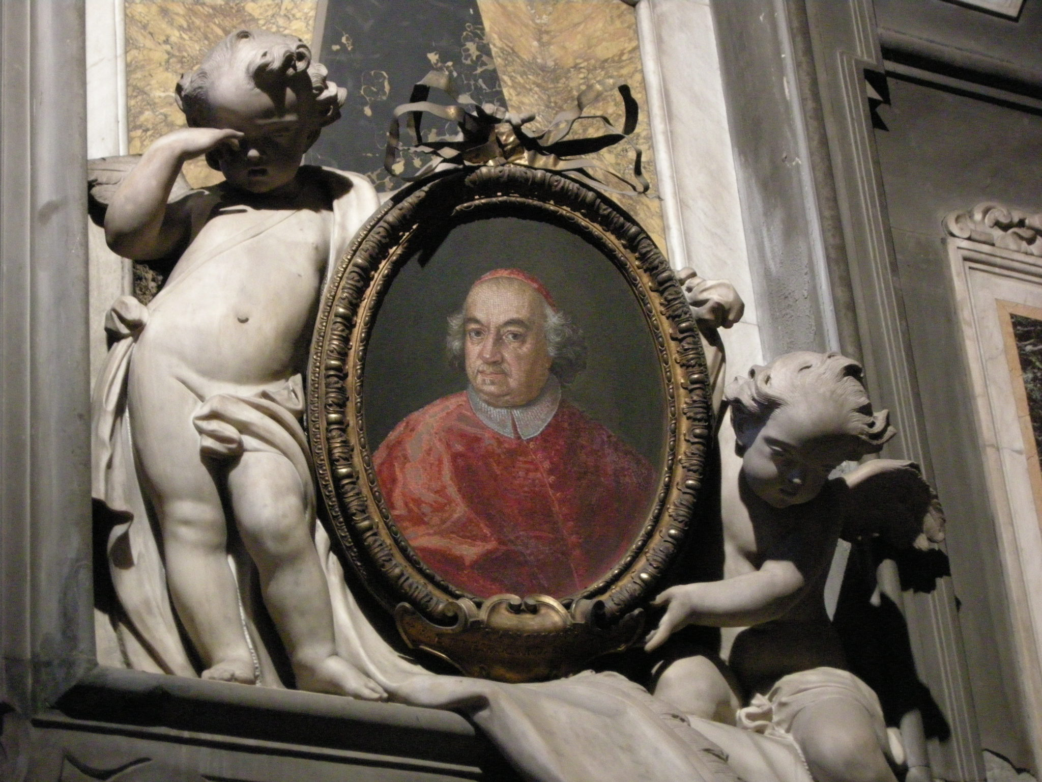 Cappella Martelli nella chiesa dei santi Michele e Gaetano a Firenze - Ritratto a mosaico dalla tomba del cardinale Francesco Martelli.